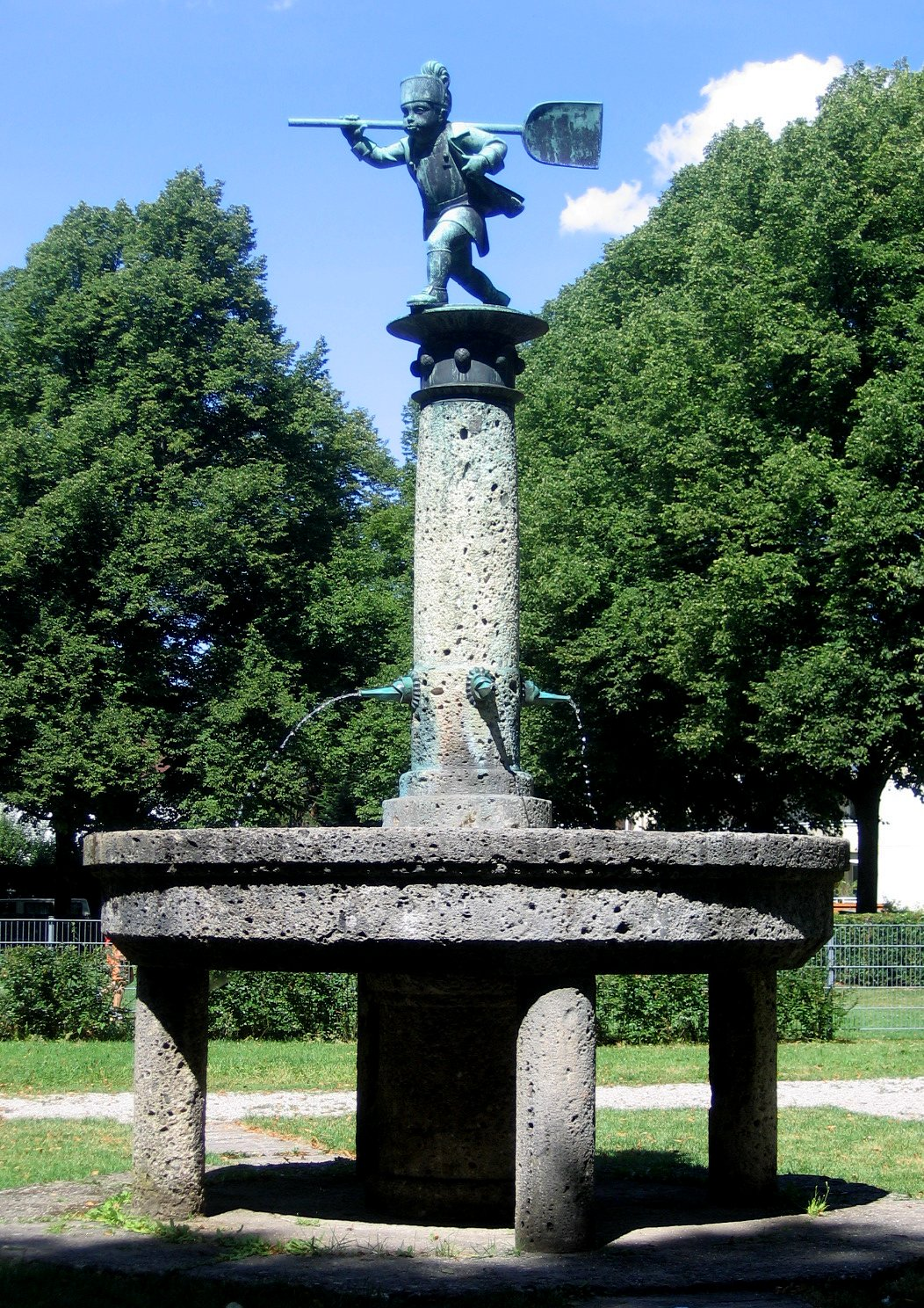 Schülein-Brunnen in München